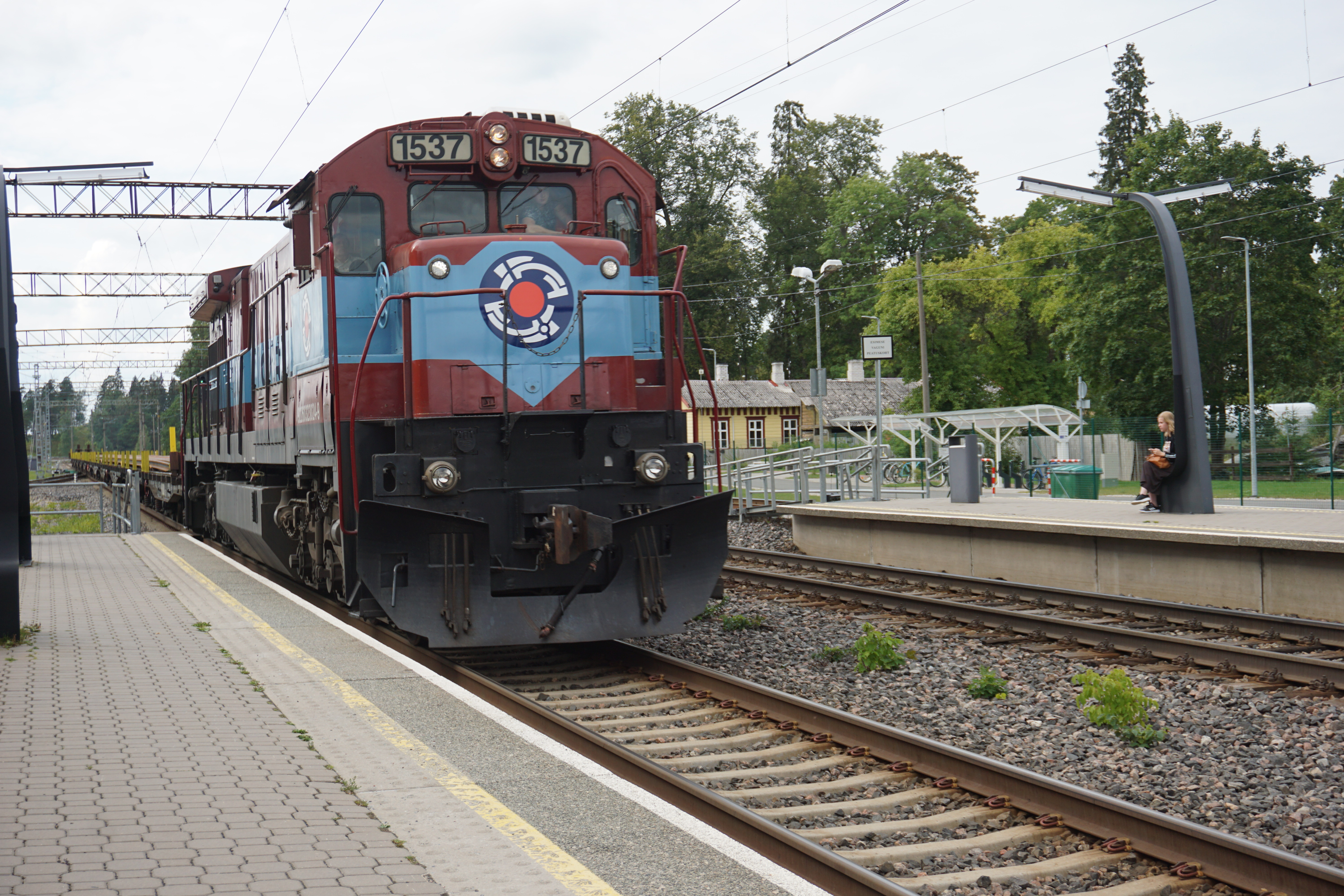 AS Operaili värvides ja logoga kaubarong (vedur C36-7i-1537) Aegviidus.